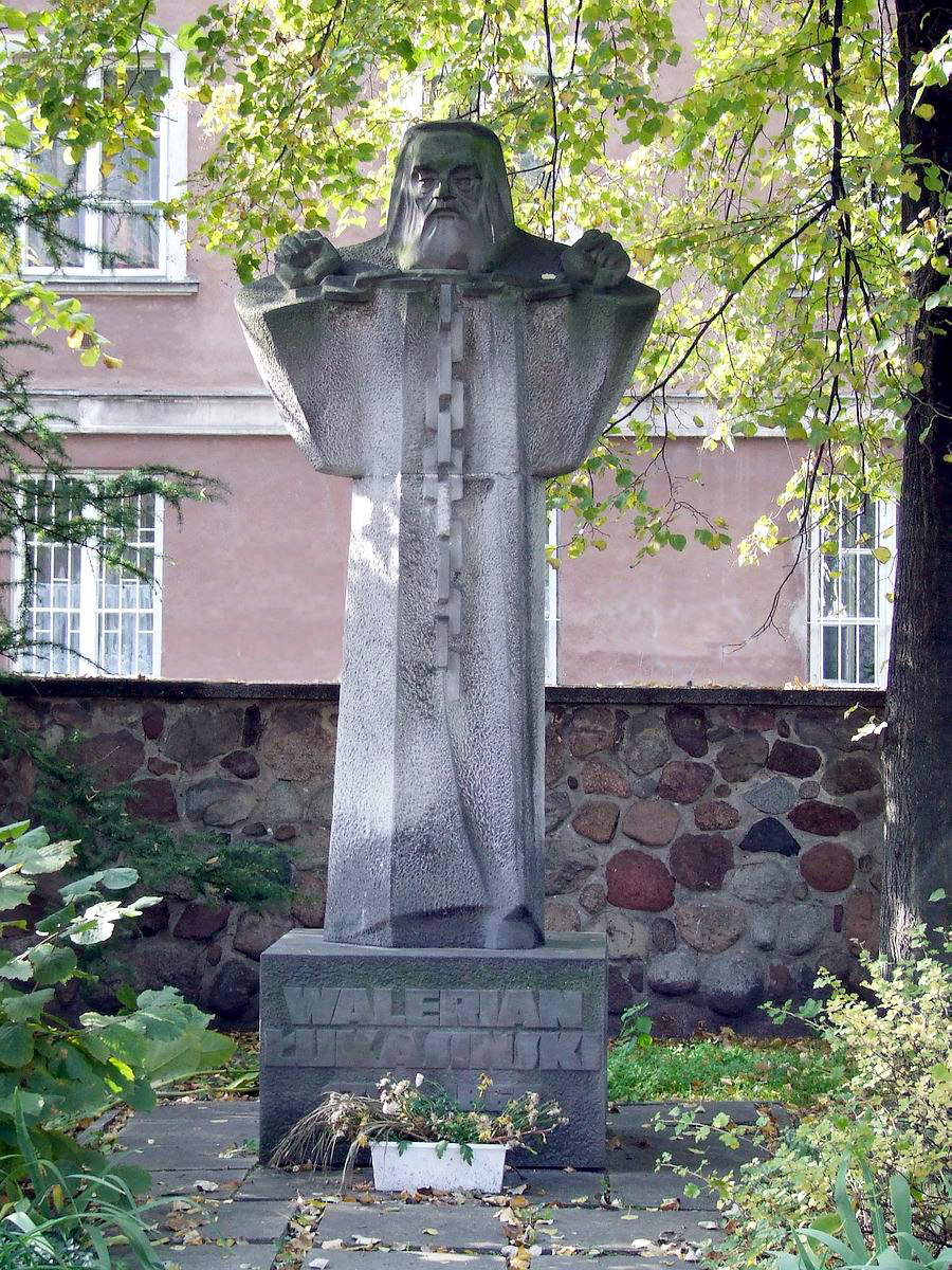 Pomnik Waleriana Łukasińskiego na Nowym Mieście w W-wie, przed kościołem NMP